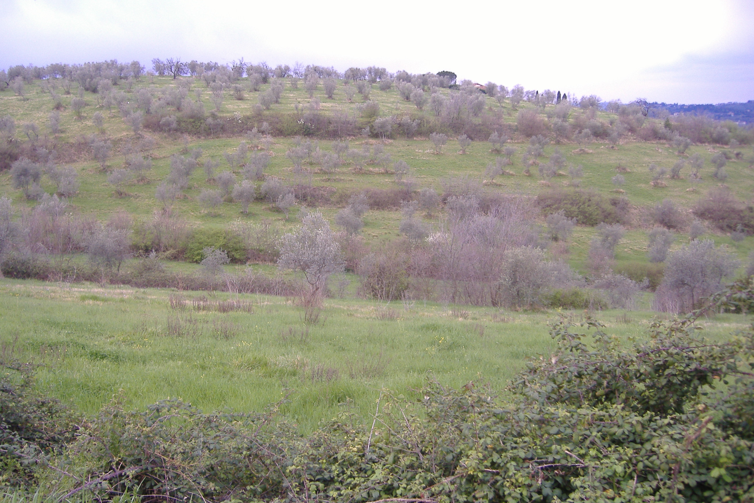 Stefano Nesti, foto personale, Panorama di ulivi visto dalle colline di Bagno a Ripoli, Licensing Categoria:Bagno a Ripoli